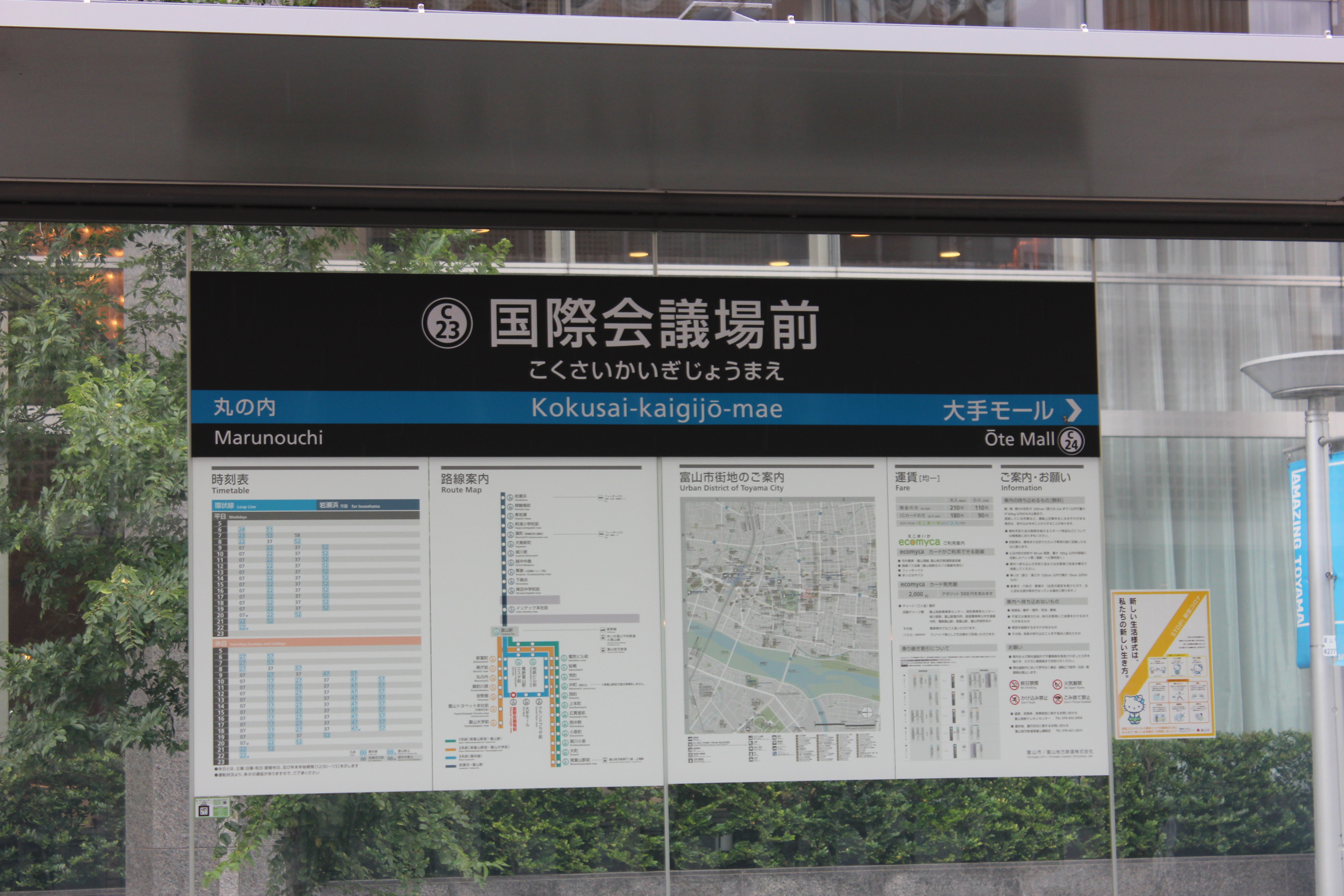 国際会議場前停留場の駅名標